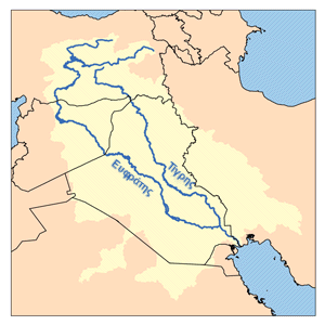 Mesopotamia rivers in Greek